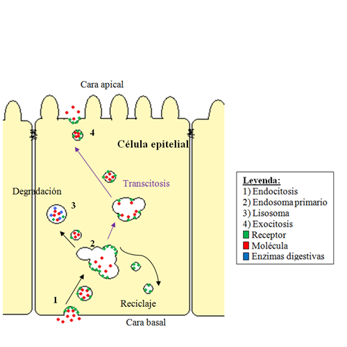 Esquema de las tres vías que pueden seguir los receptores en la endocitosis mediada por receptores.